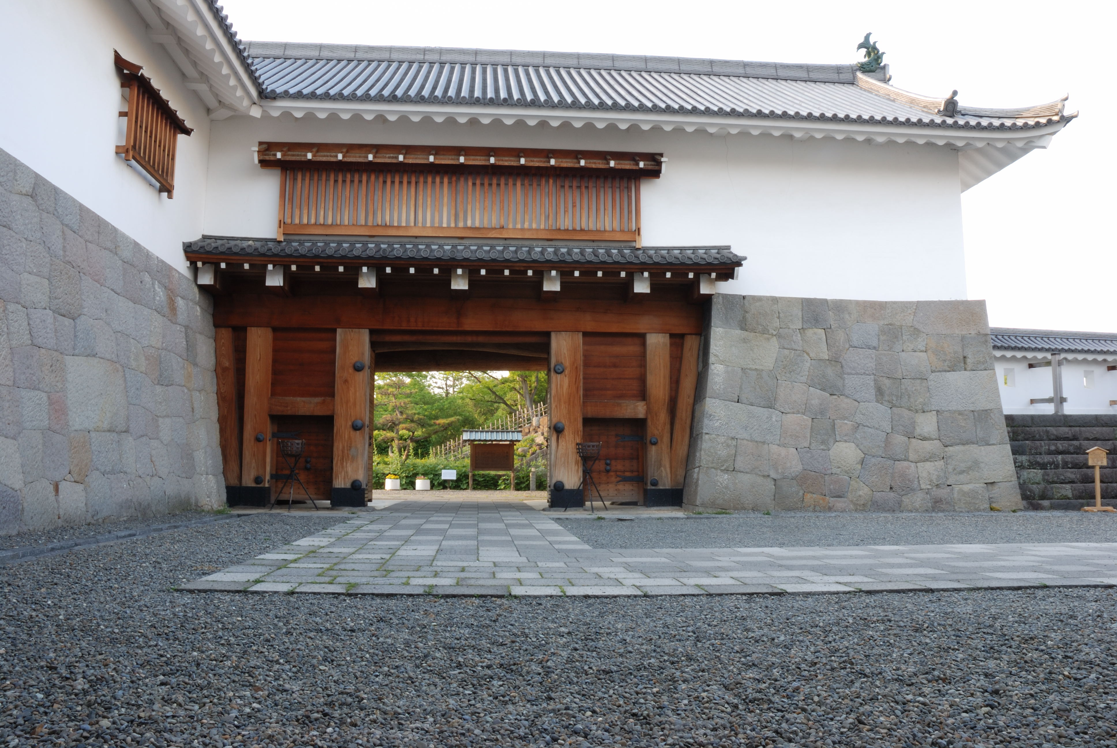 Higashigomon yaguramon